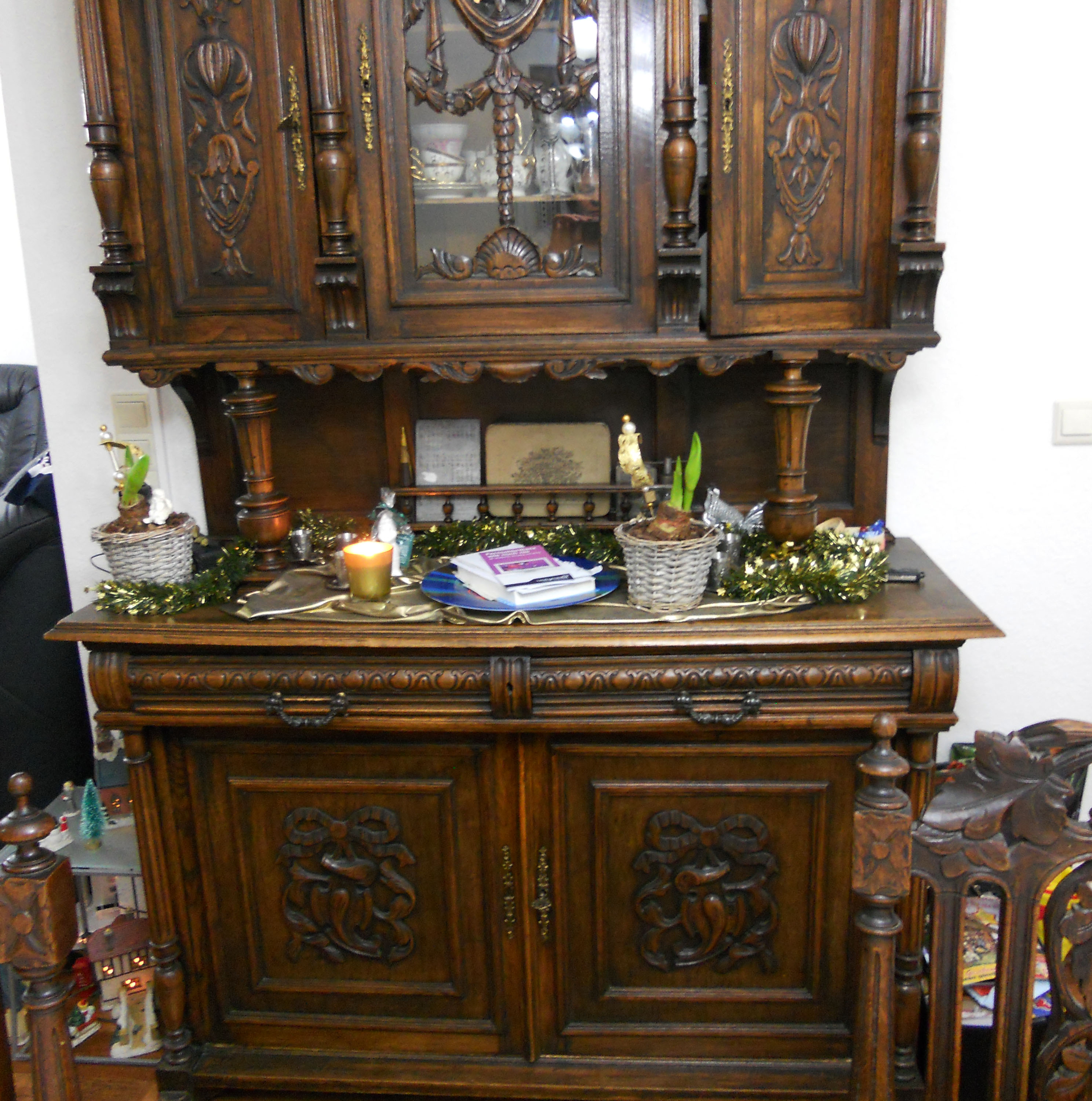 Schrank Esszimmer